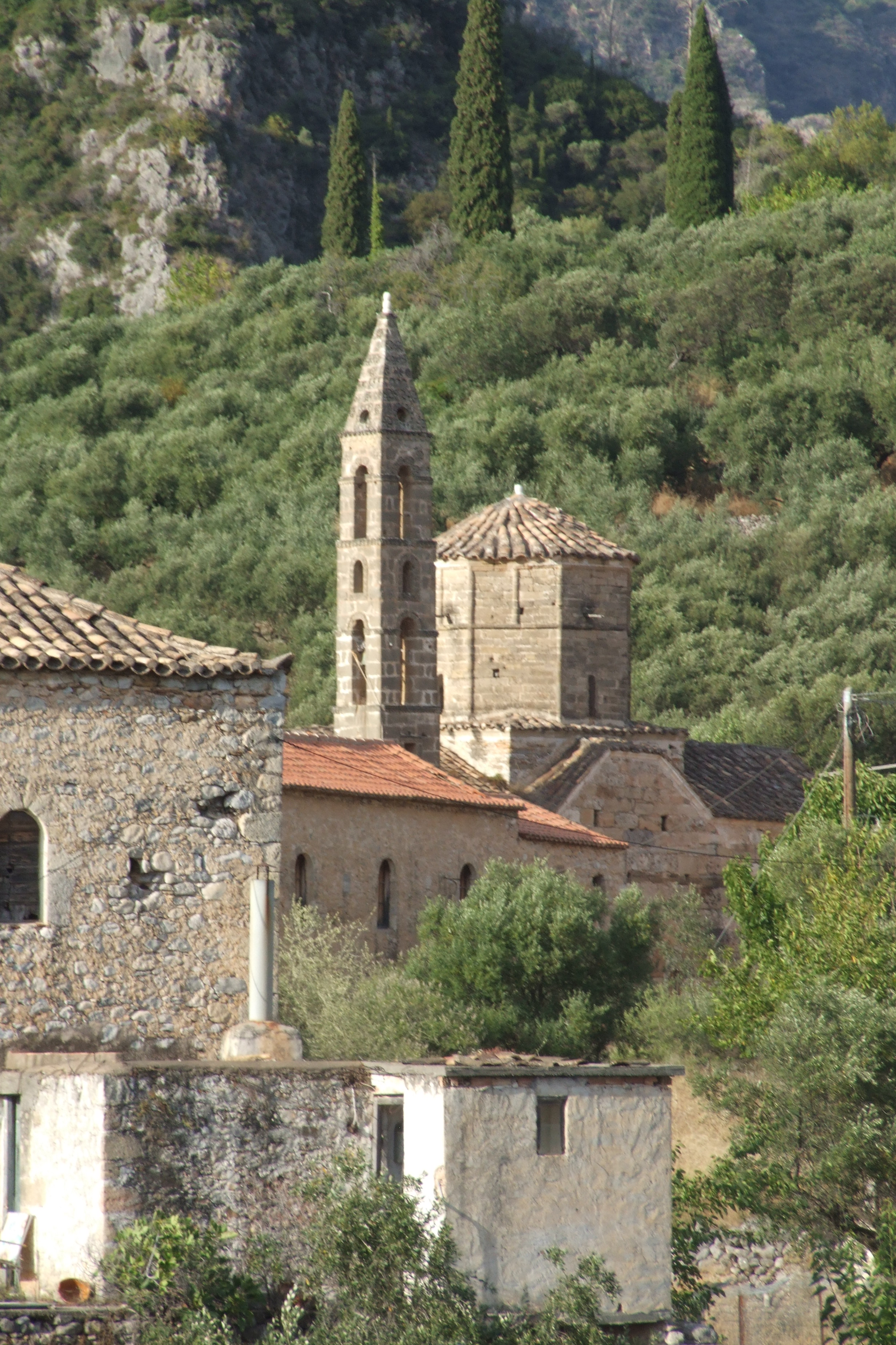 Impression aus Kardamyli